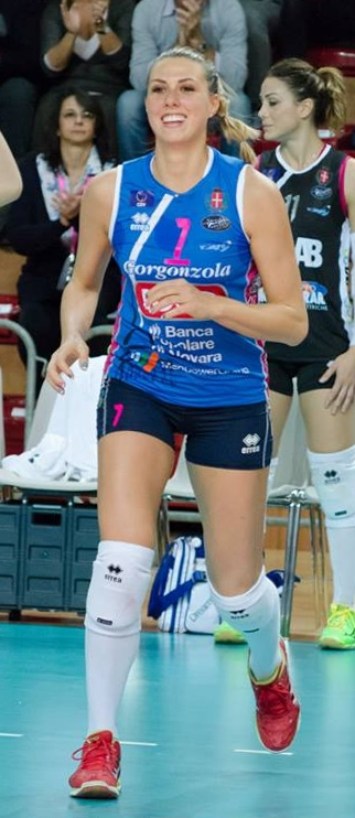 Martina Guiggi, pallavolista italiana, gioca nel ruolo di centrale